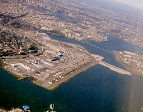 Vista aérea de LaGuardia LaGuardia Airport, New York, United States. Author: Javier Pérez B.